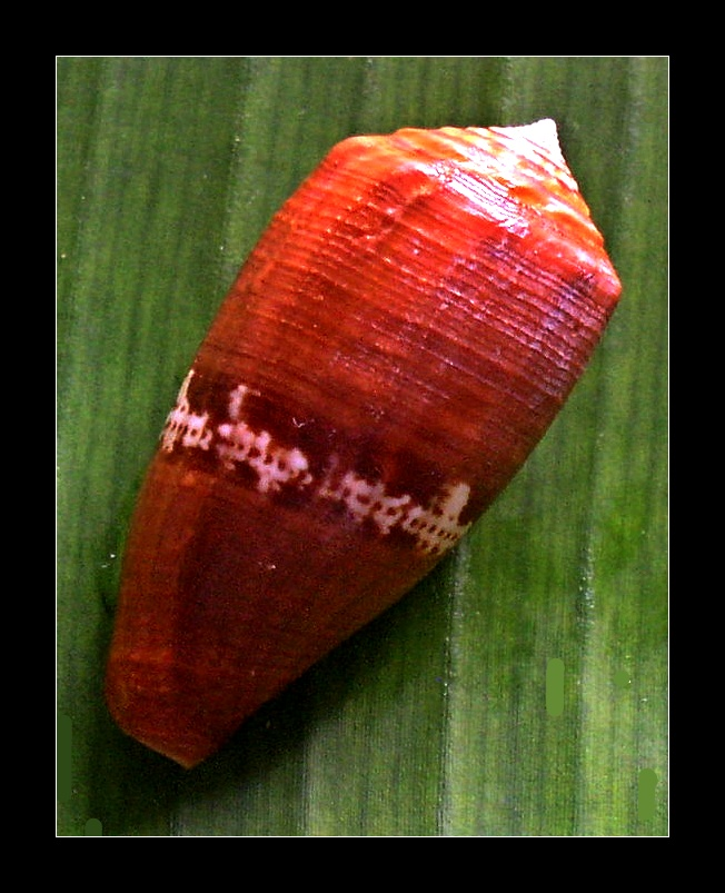 Cumings Cone - Conus cumingii